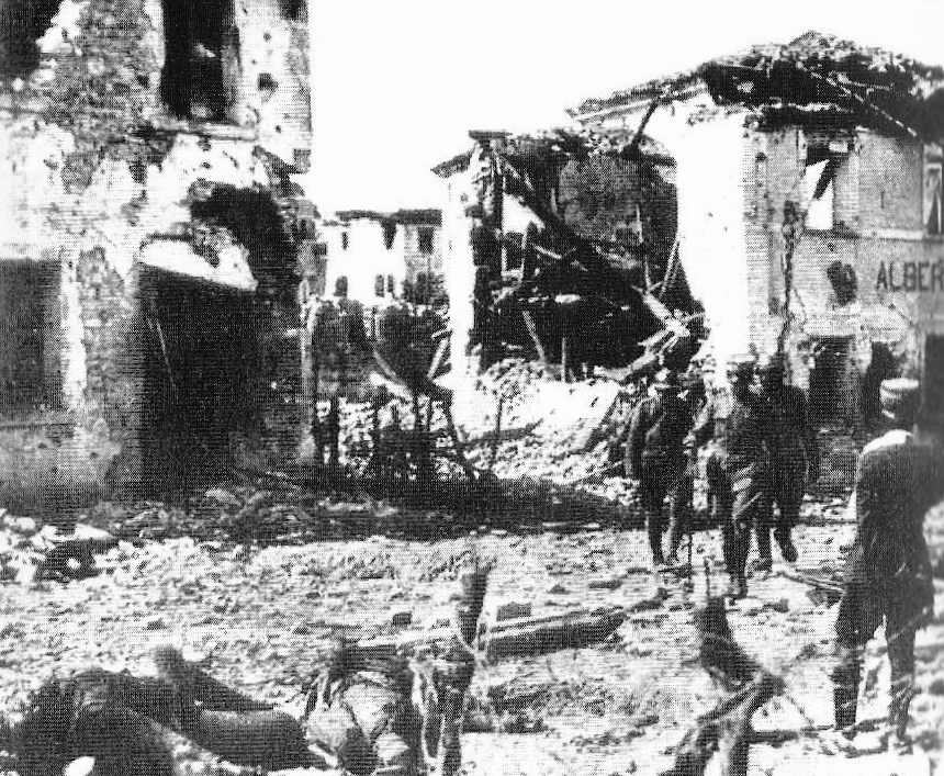 Militari italiani tra le rovine di Nervesa durante la battaglia di Vittorio Veneto